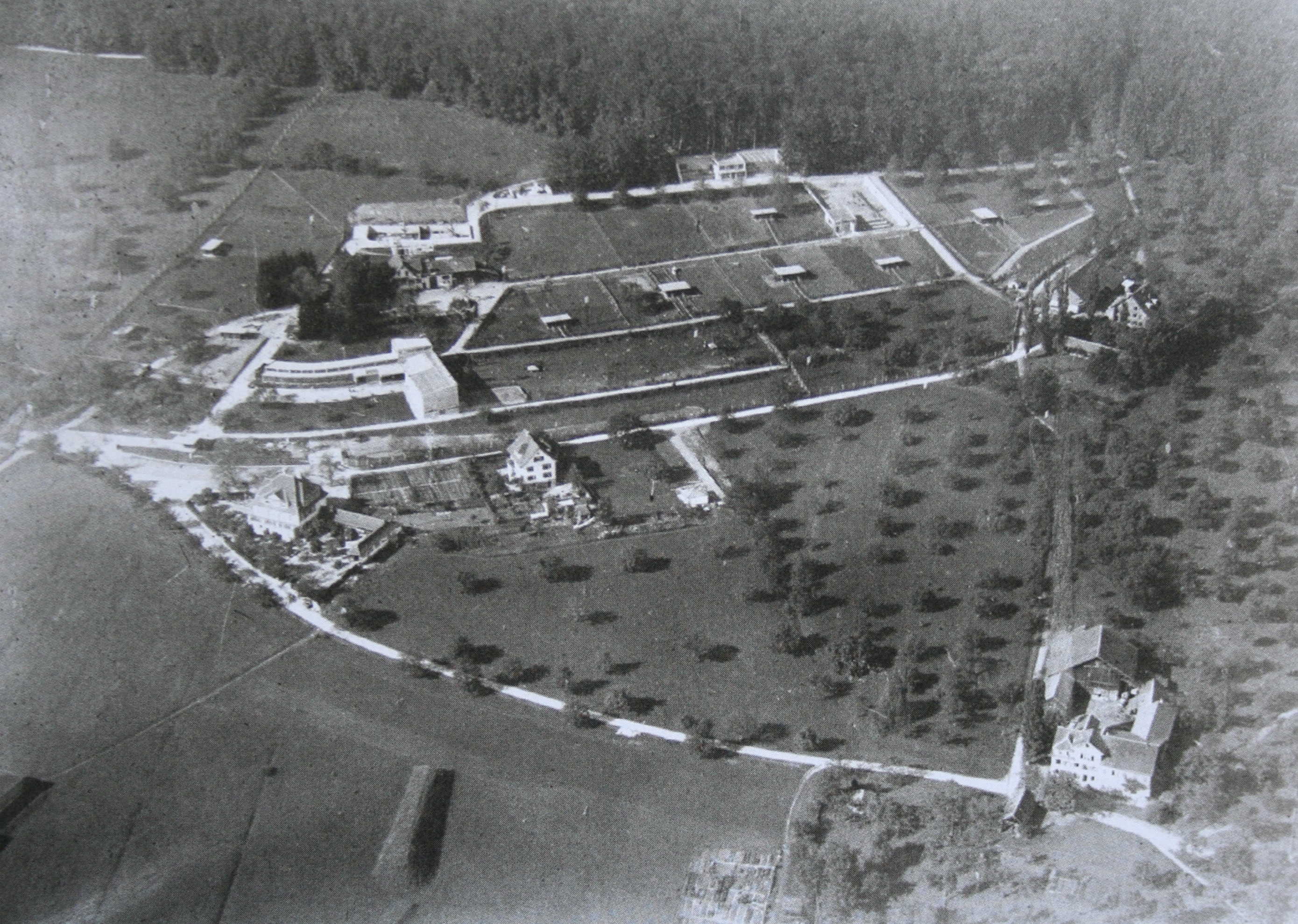 Zoo Zürich 1930, Aufnahme von Walter Mittelholzer (1894 - 1937)